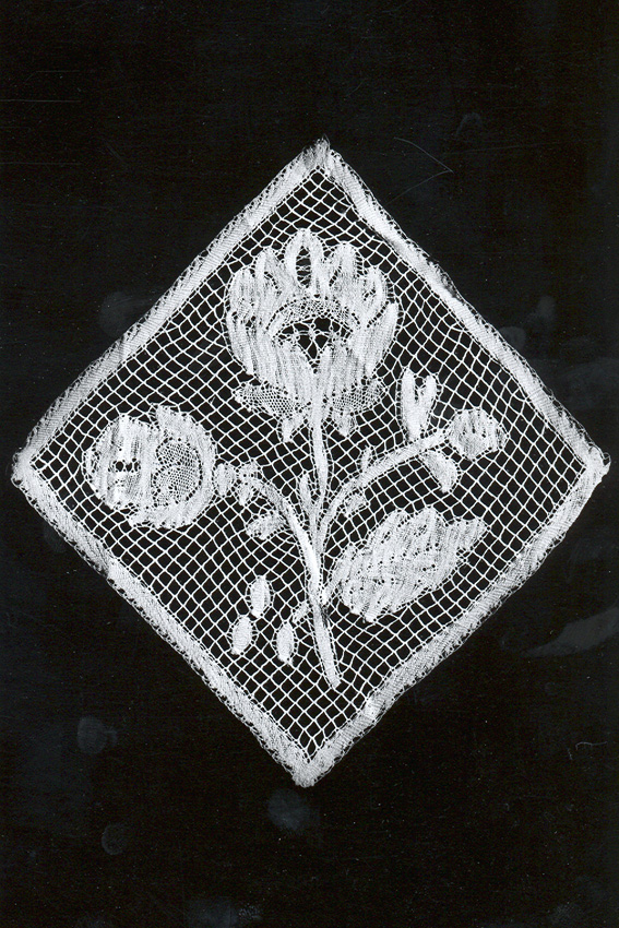 MoMu Collection S74/60B. Siermotief in Valenciennes kloskant, 1850-1900. Go to and type in the MoMu collection number to find more information about the object.